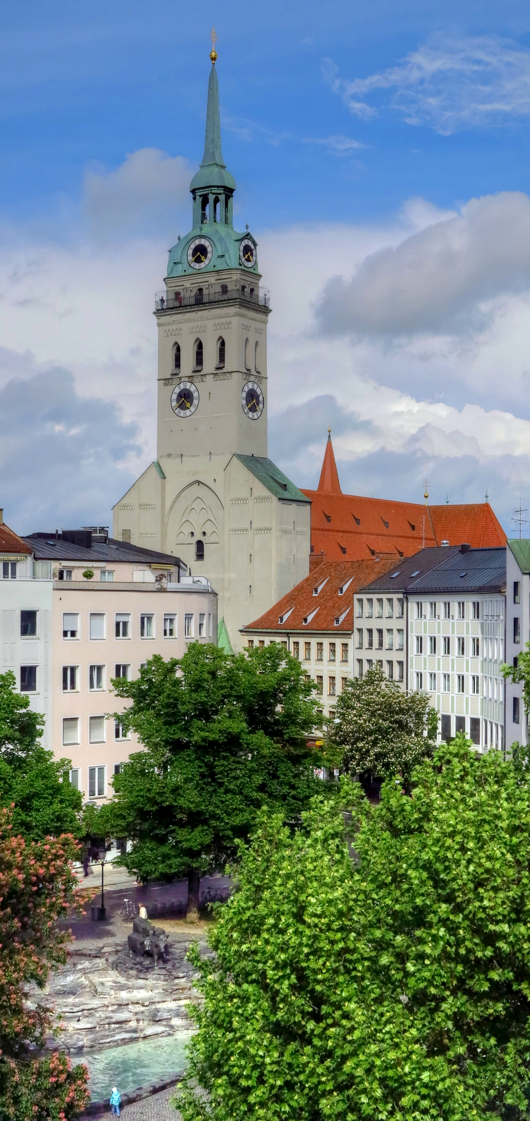 Deutschland, Bayern, München, Kirche: Alter Peter, Rindermarkt